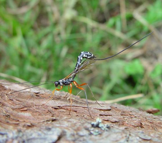 Schlupfwespe Rhyssa persuasoria, aufgenommen von Reto Burri, Bern